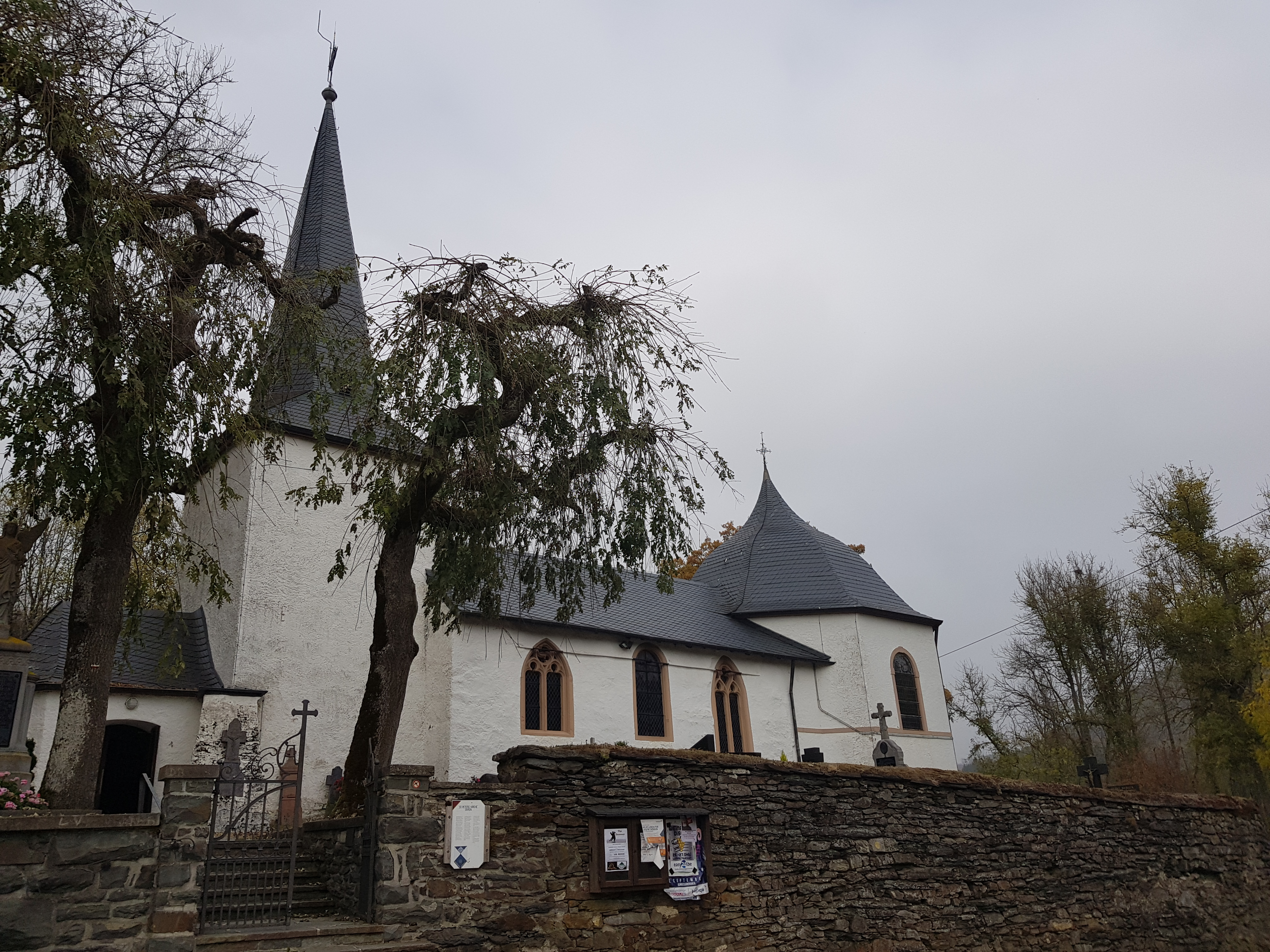 Kirche St. Peter, Ouren This photo of immovable heritage has been taken in the Walloon Region